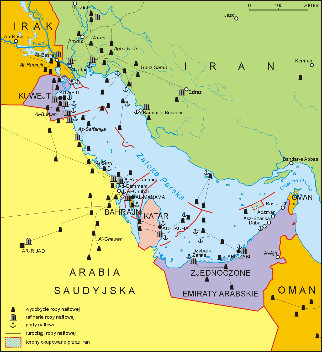 Mapa polityczna Zatoki Perskiej z zaznaczonymi miejscami wydobycia ropy i rafineriami. Autor: Aotearoa